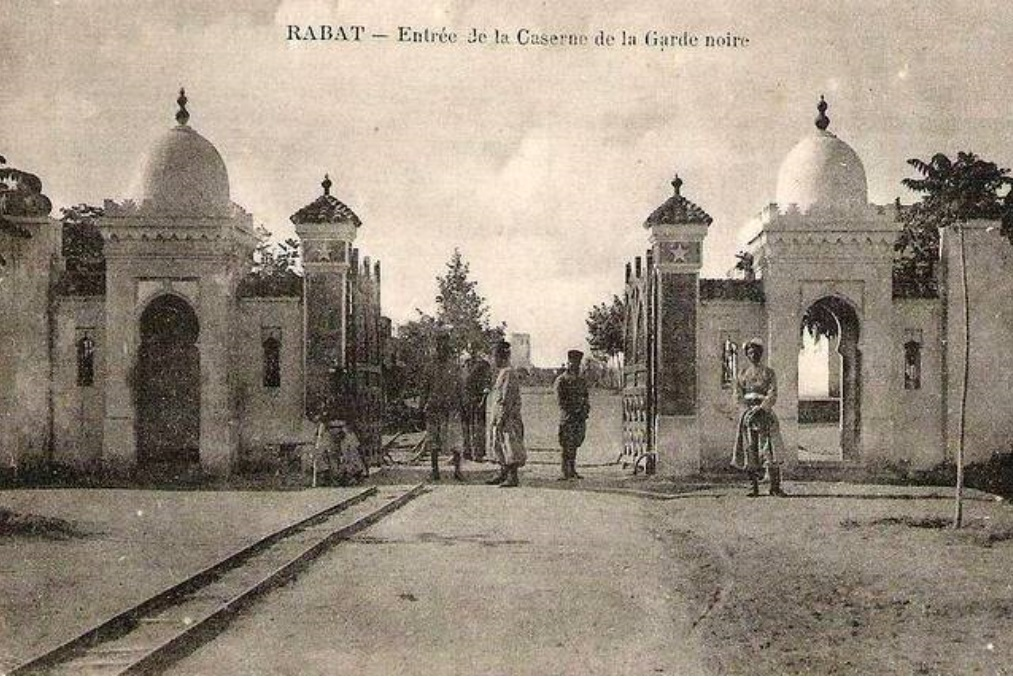 Rabat - Entree de la Caserne de la Garde noir. Rails Decauville devant la caserne de la Garde du Sultan aprés Bab Rouah.